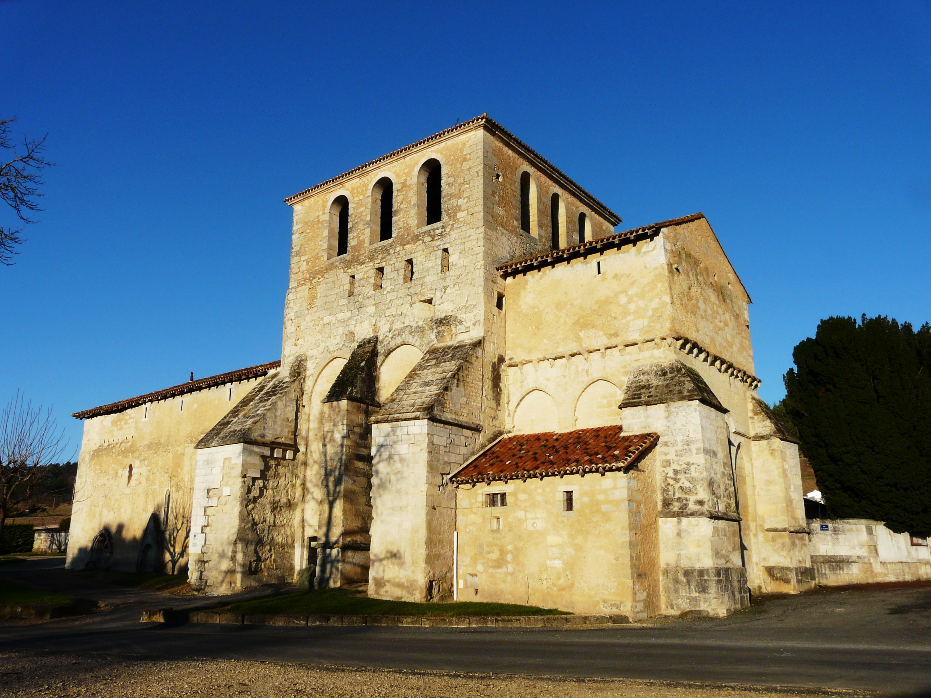 L'église Saint-Martin, Agonac, Dordogne, France